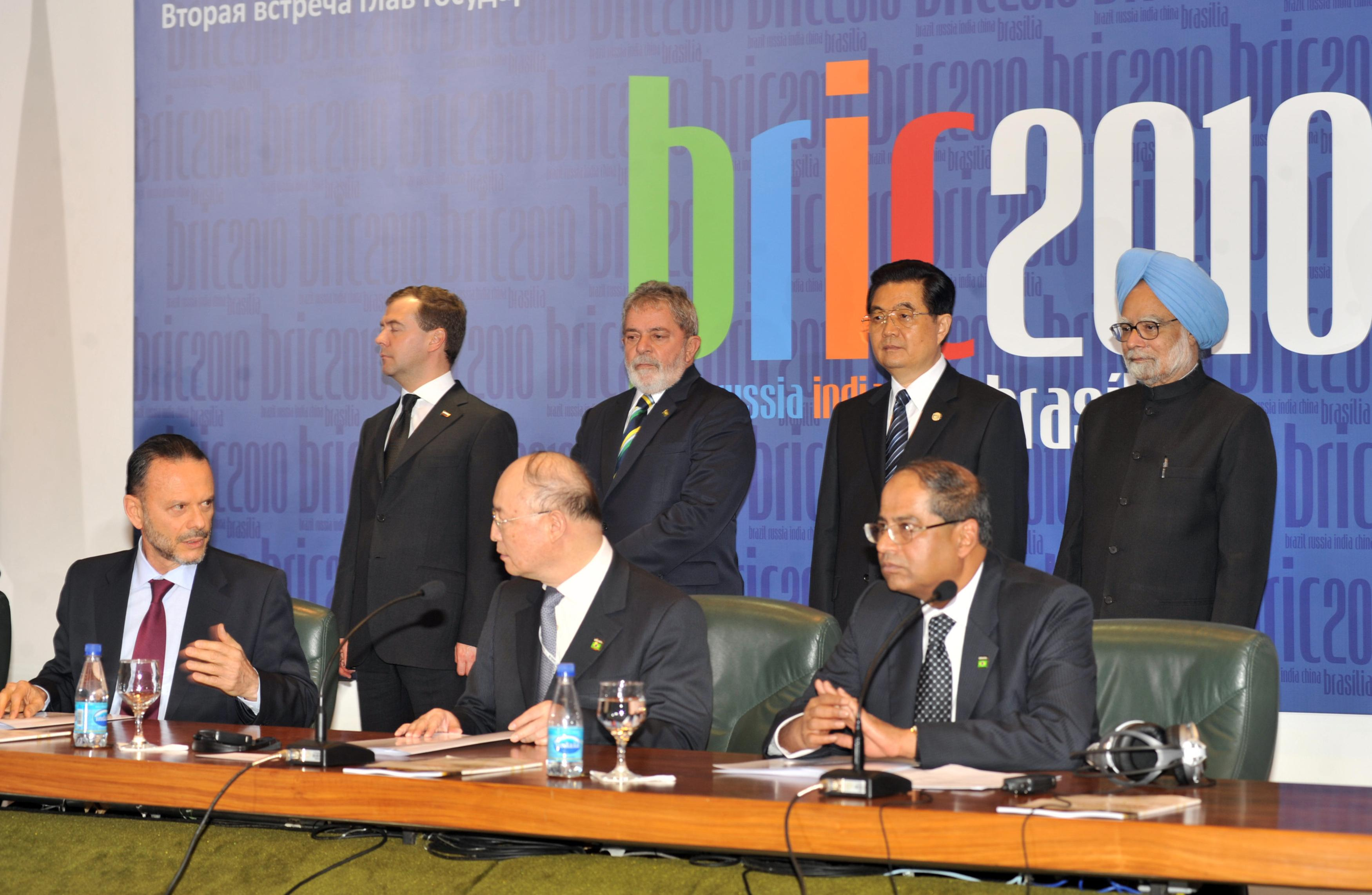 Brasília - O presidente da Rússia, Dmitri Medvedev, o presidente Lula, o presidente da China, Hu Jintao, e o primeiro-ministro da Índia, Manmohan Singh, aguardam assinatura de acordo entre os representantes dos respectivos bancos de desenvolvimento, durante a 2ª Cúpula de Chefes de Estado e de Governo do BRIC (José Cruz/ABr)